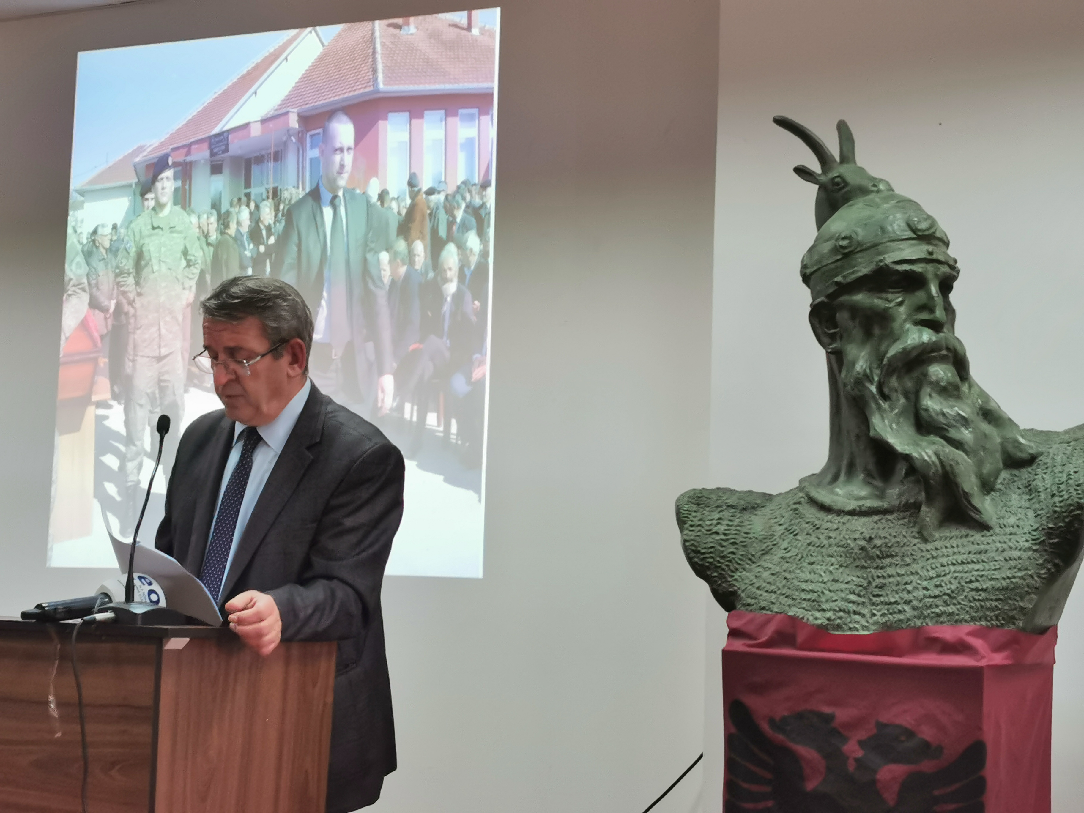 Në Kuvendin e II te shoqatës Kosova për Sanxhakun